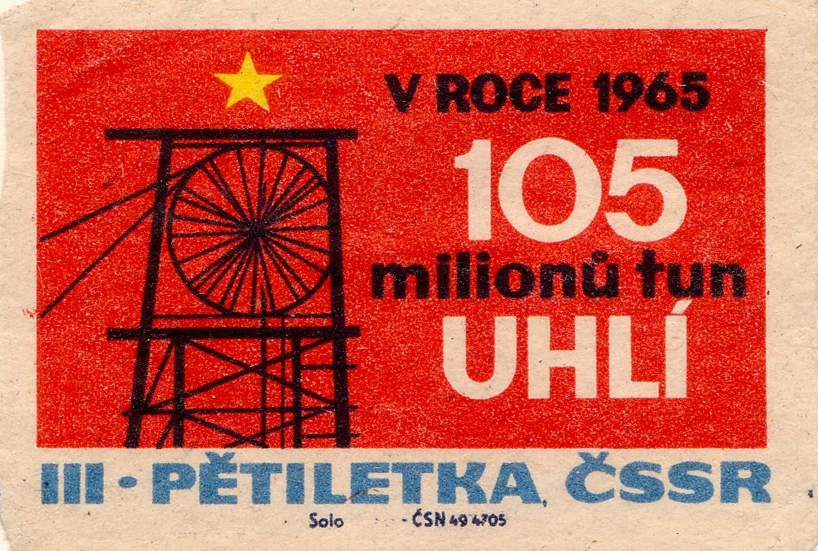 nálepky z roku 1961